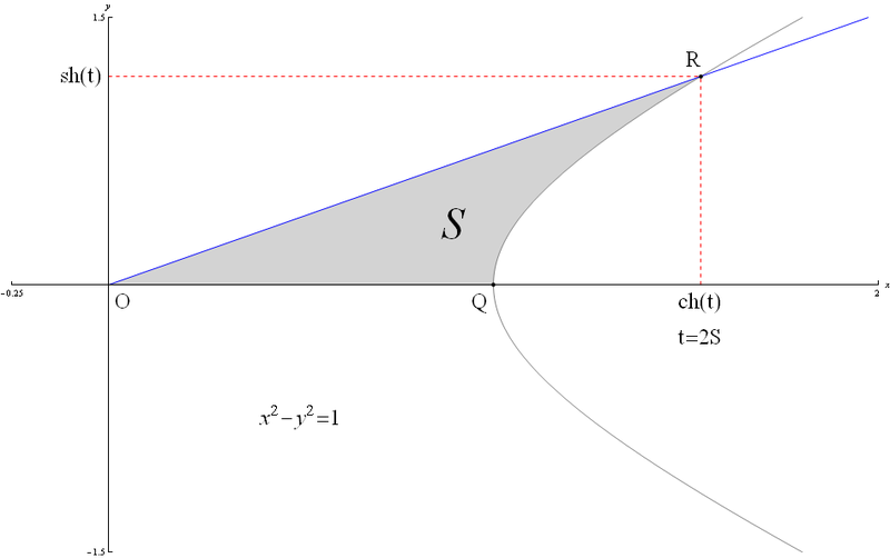 Հիպերբոլական սինուսի և կոսինուսի սահմանումը հիպերբոլայի միջոցով